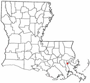 Volapük: Topam in tat: Louisiana.